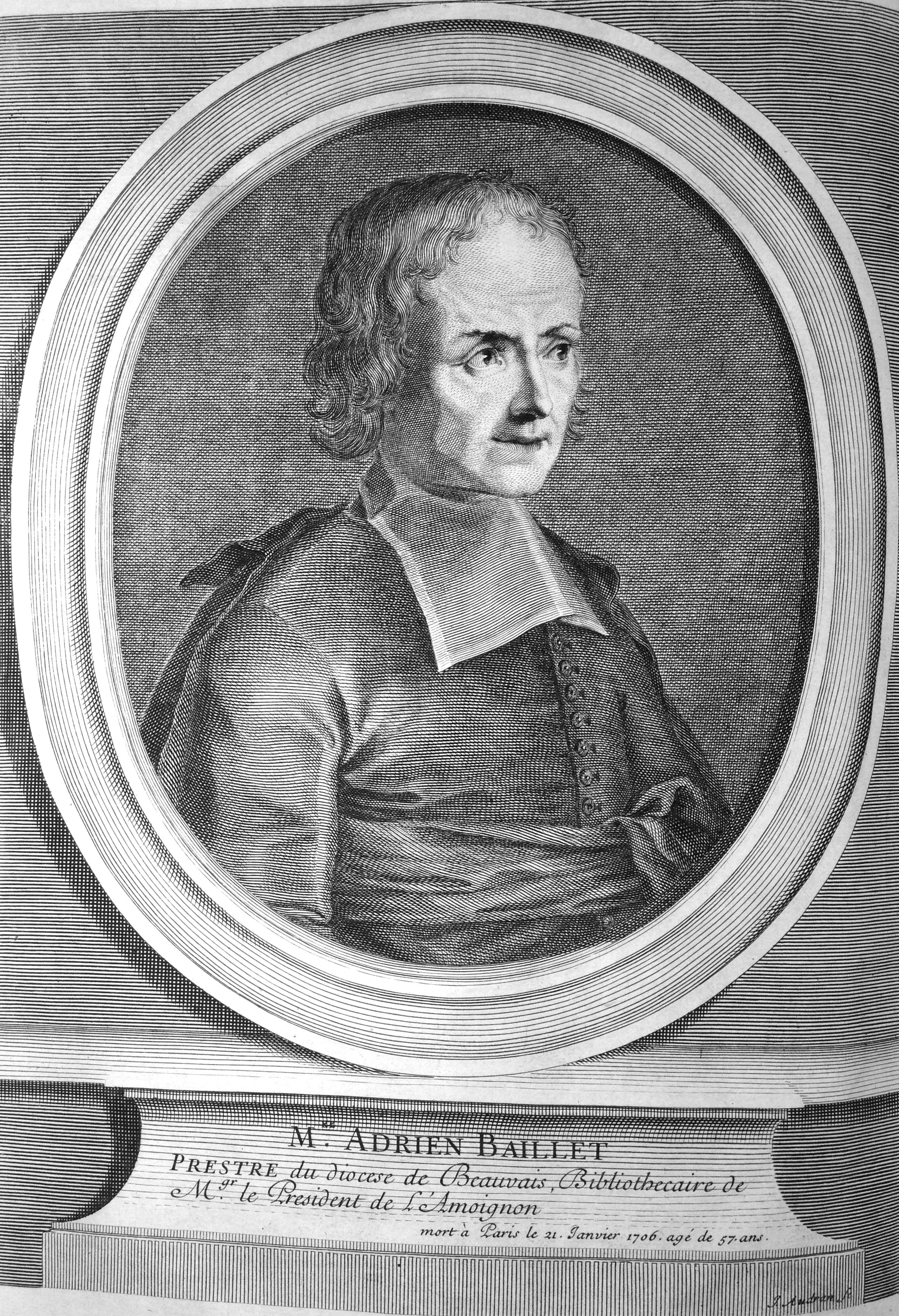 Adrien Baillet, gravure, postuum (1715)